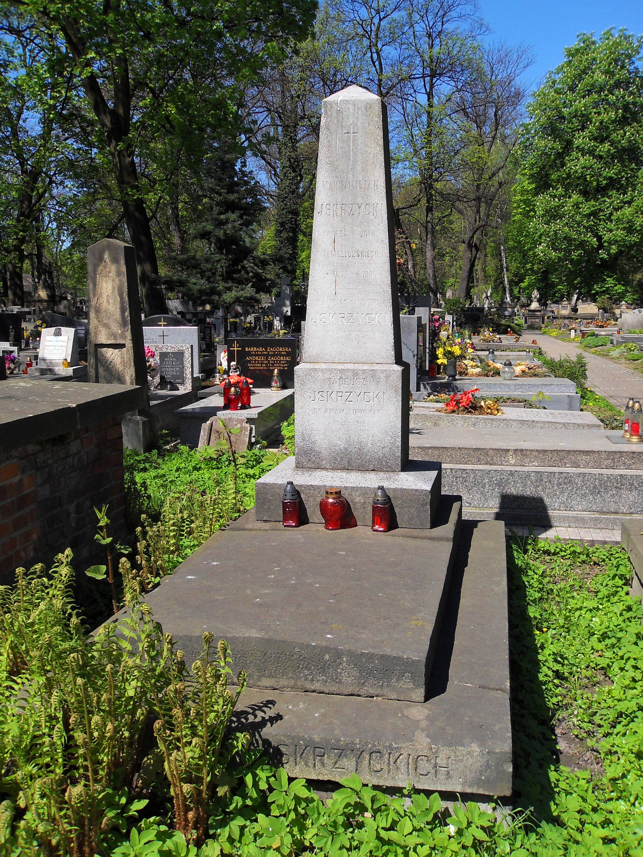 Grobowiec prof. Maksymiliana Iskrzyckiego, dr. Aleksandra Iskrzyckiego i dr. Tadeusza Iskrzyckiego na Cmentarzu Rakowickim w Krakowie.